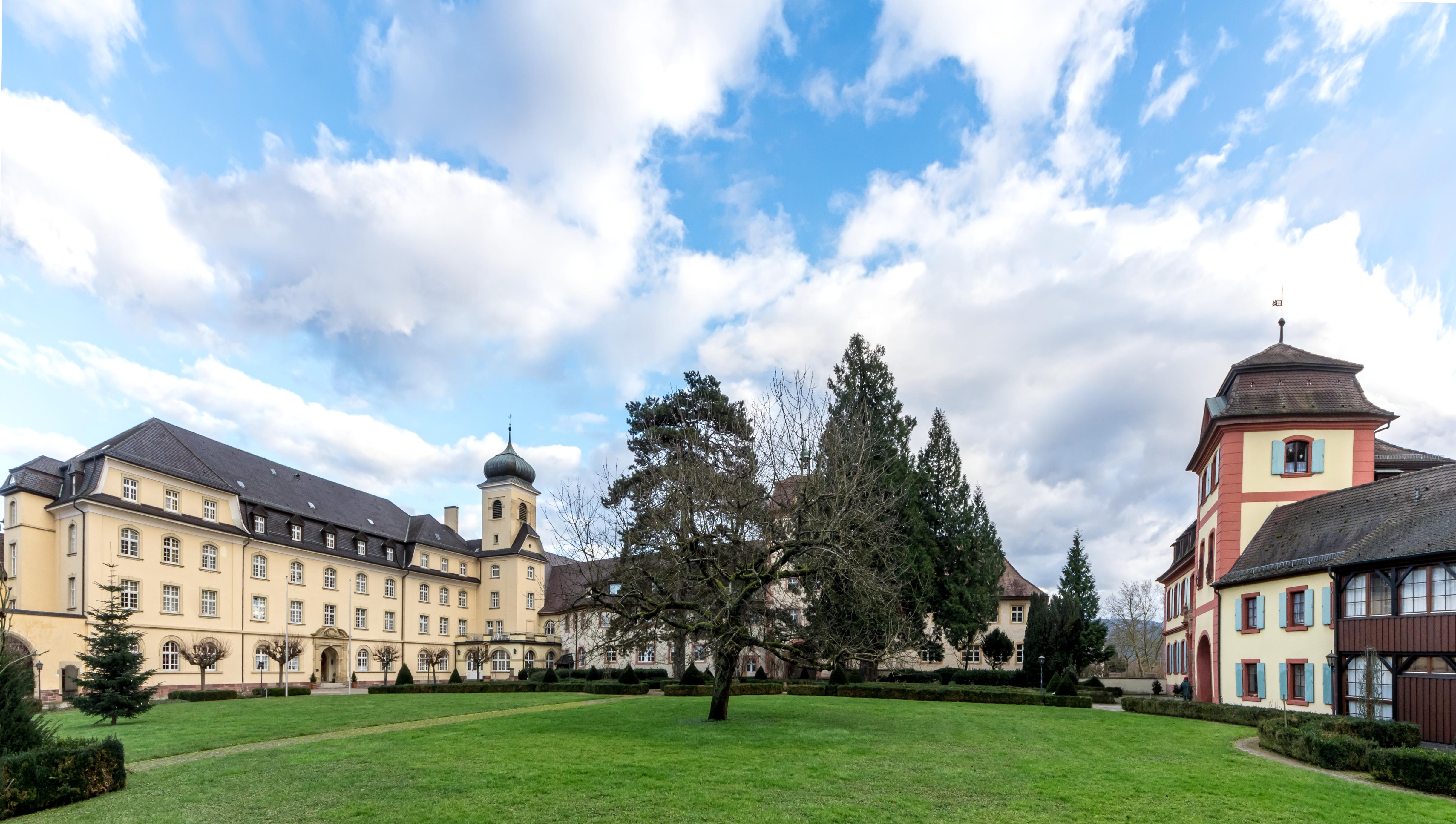 Bilder aus Heitersheim Das ehemalige Malteserschloss Heitersheim, jetzt im Besitz des Ordens der barmherzigen Schwestern vom Hl. Vinzenz von Paul. Innenansicht Vorhof